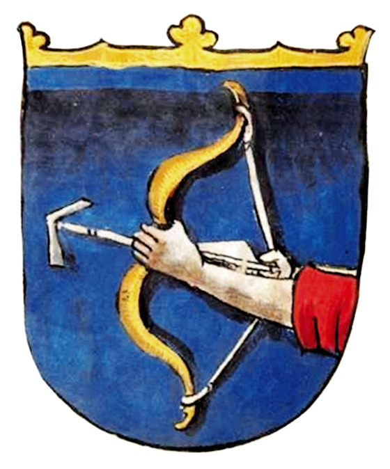 Герб Киева из «Гербовника» Конрада Грюненберга, изд. 1480 года, С. 59.